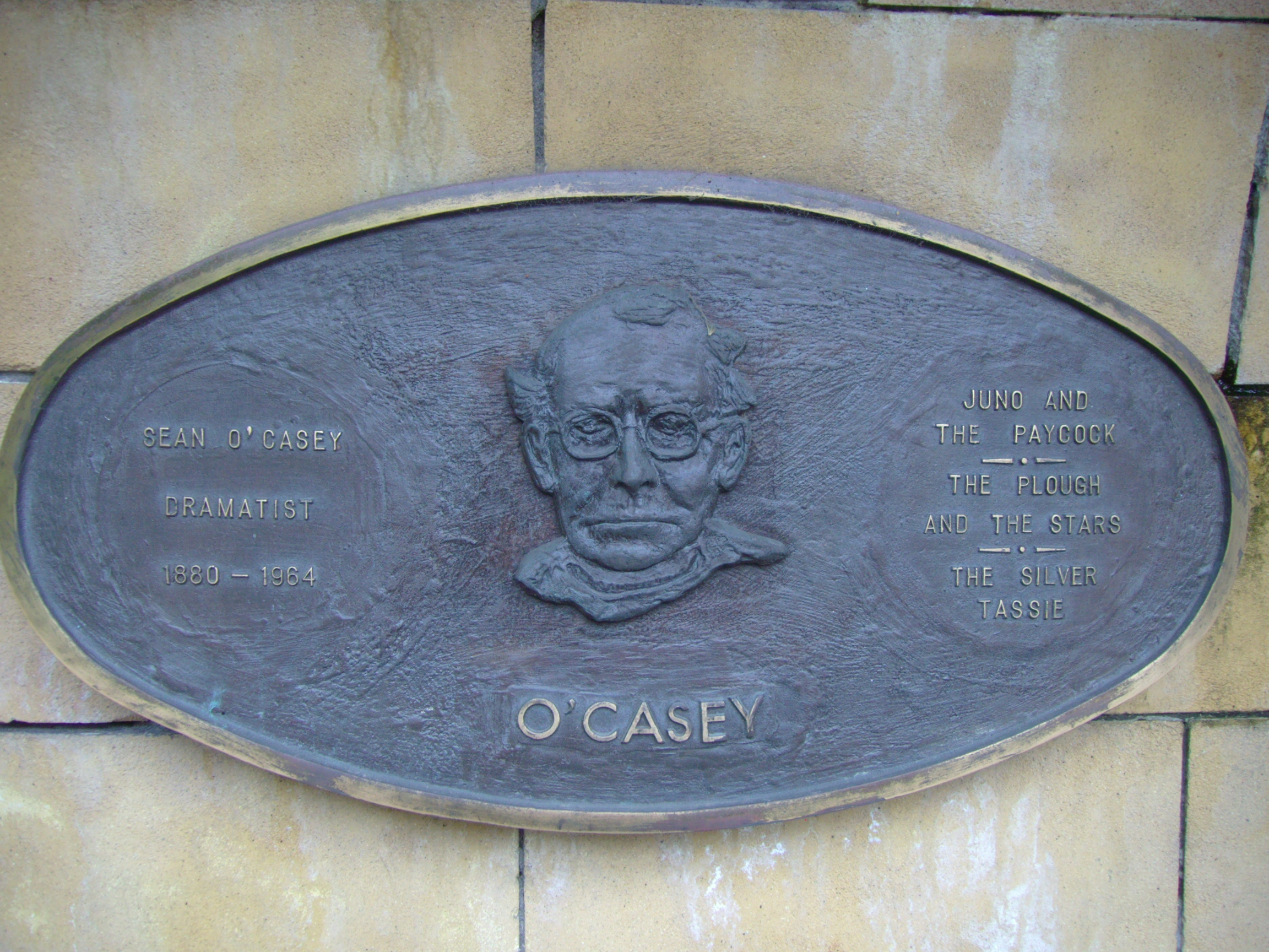 Sean O’Casey (1880–1964), irischer Dichter; Plakette im Saint Patrick's Park, Dublin, dort angebracht anlässlich der Dublin Millennium 988–1988 Literary Parade